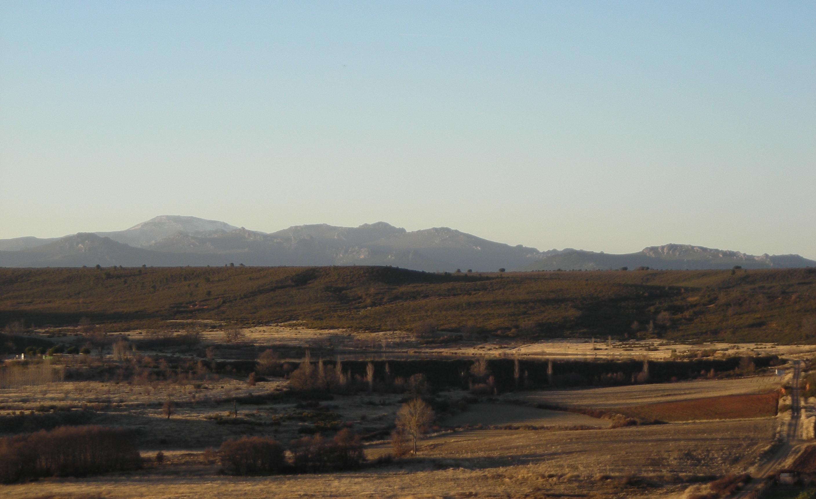 Imagen del embalse de Requejo en Ayoó de Vidriales, provincia de Zamora (Castilla y León).